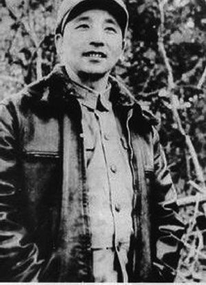 秦基伟任中国人民志愿军第十五军军长时于朝鲜战场的留影